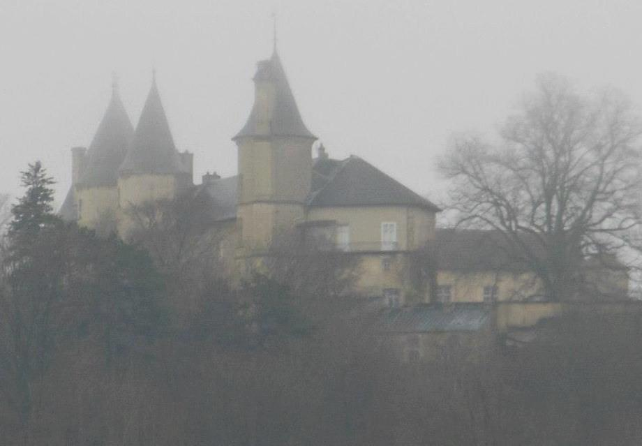 Photographie du château de Bourlémont (XIIIe s), à Frebécourt (88).